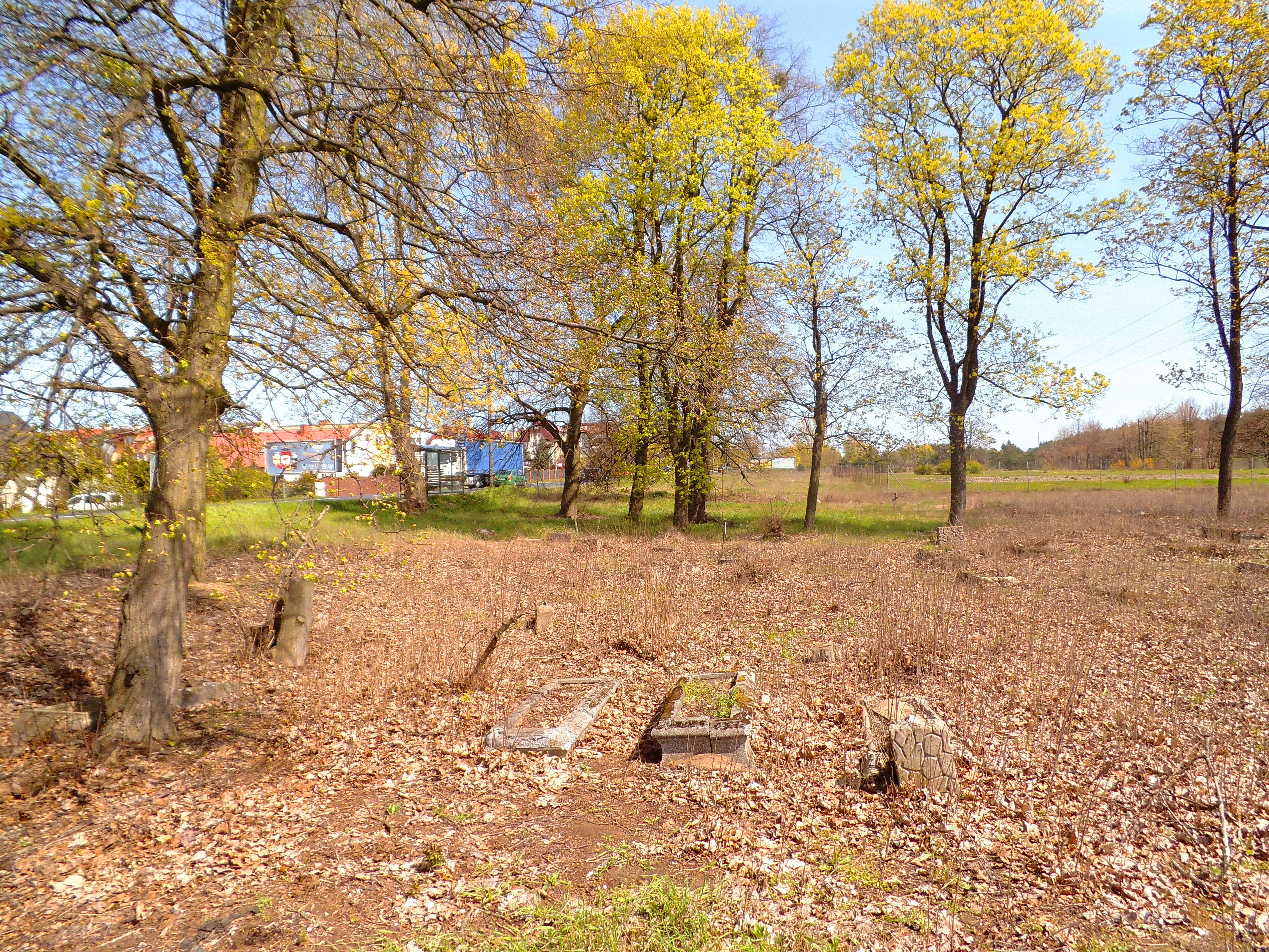 Cmentarz ewangelicki na Podgórzu w Toruniu (ul. Poznańska 313)